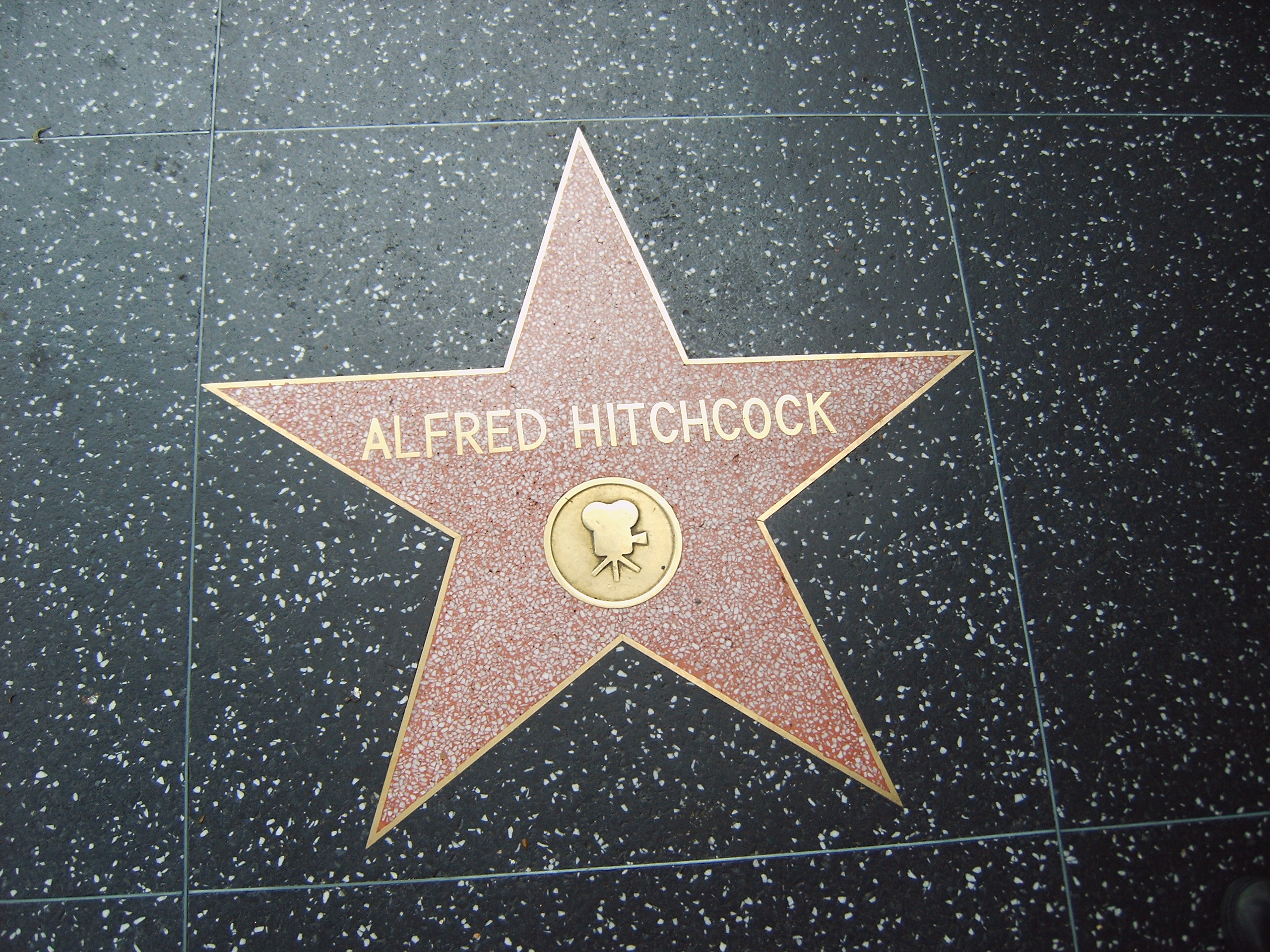 Estrella del Passeig de la Fama.